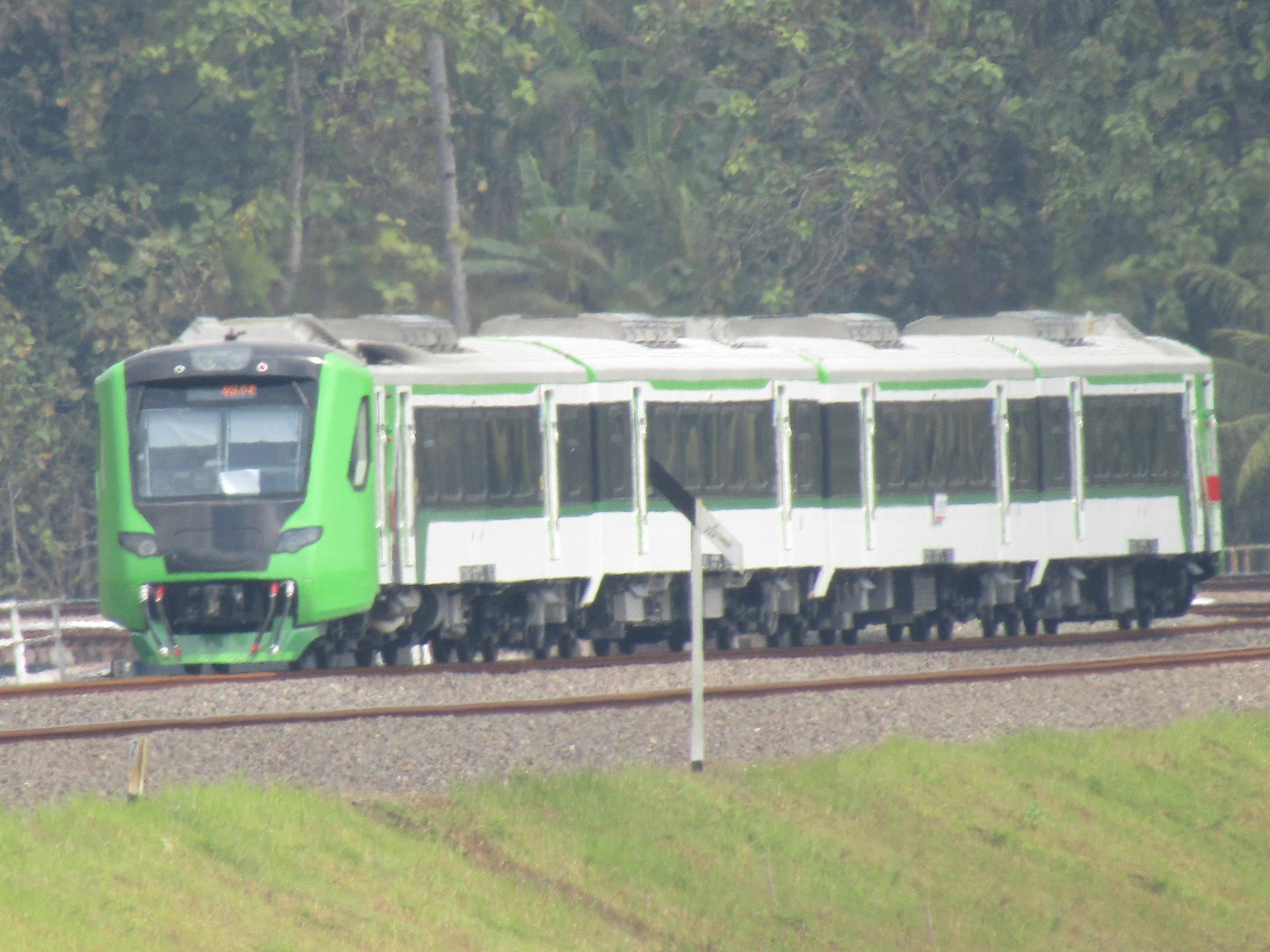 Kereta api Solo Ekspres, Kutoarjo-Solo Balapan pp